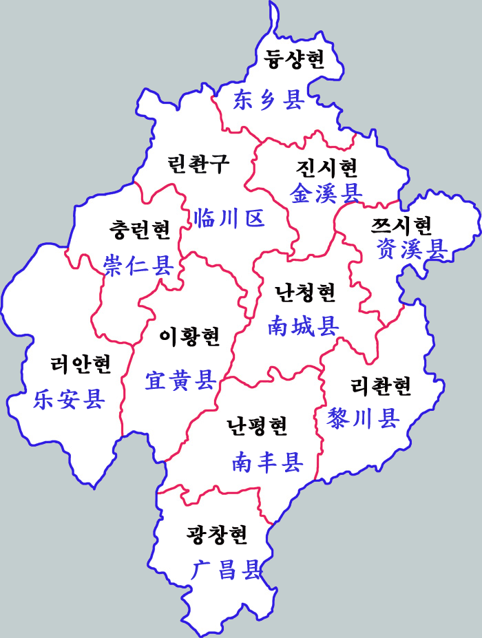 푸저우시 현급구역도